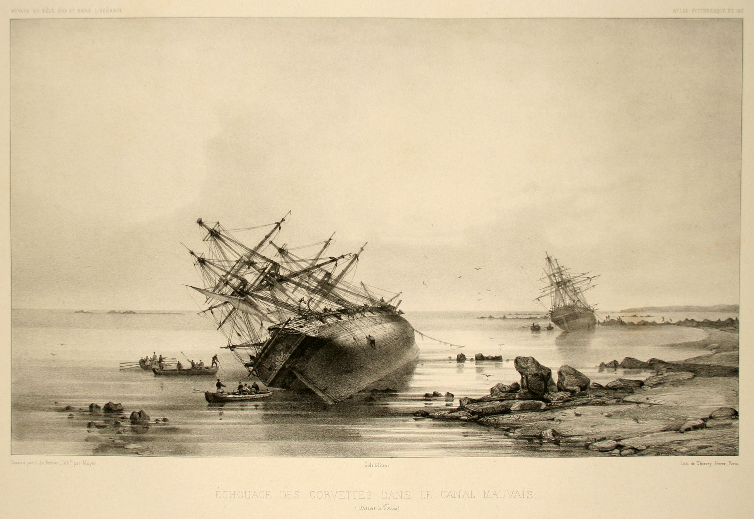 Échouage des corvettes dans le Canal Mauvais. Atlas pittoresque, planche 187